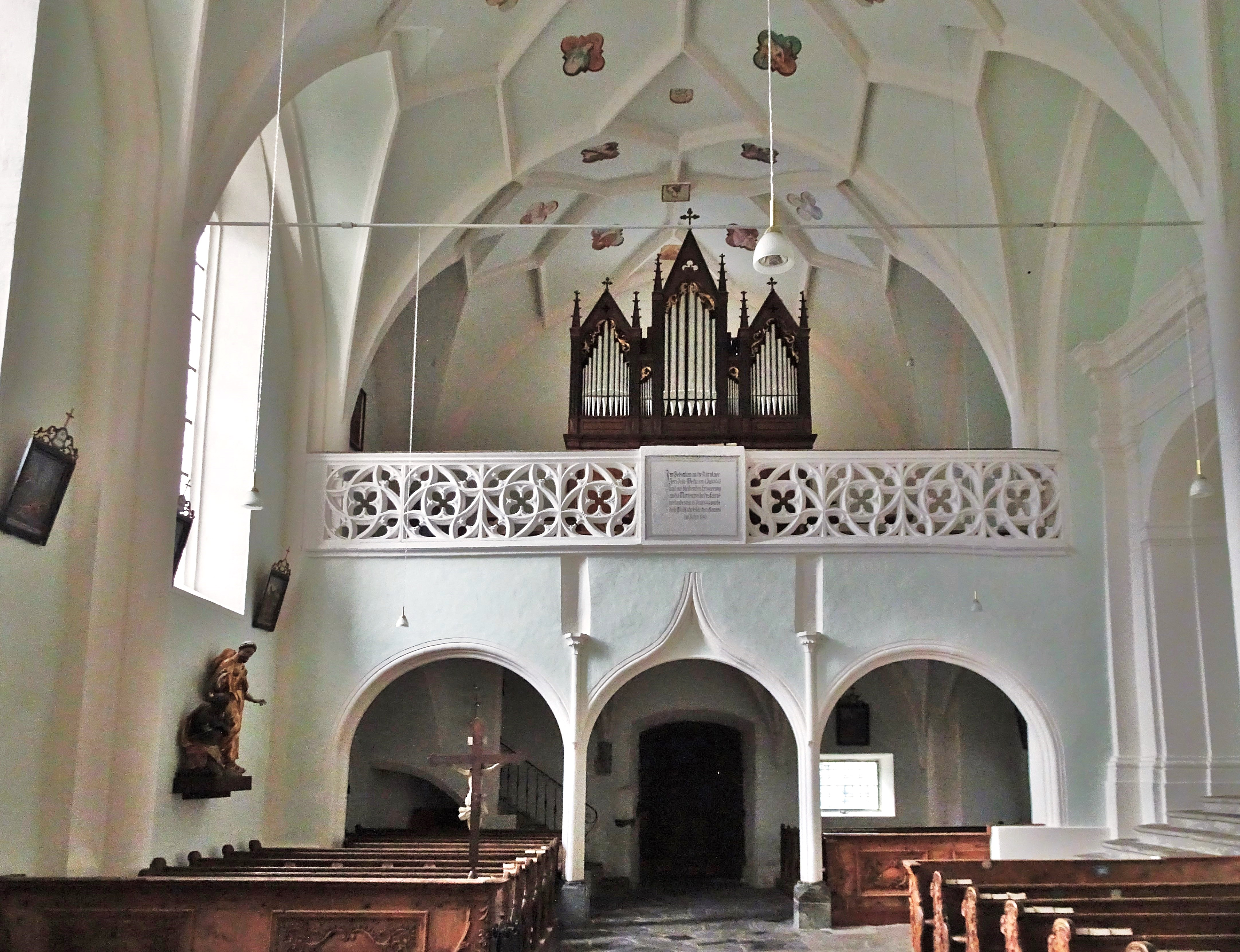 Kath. Filialkirche Maria Tax (Stallhofen), Innenansicht gegen die Empore